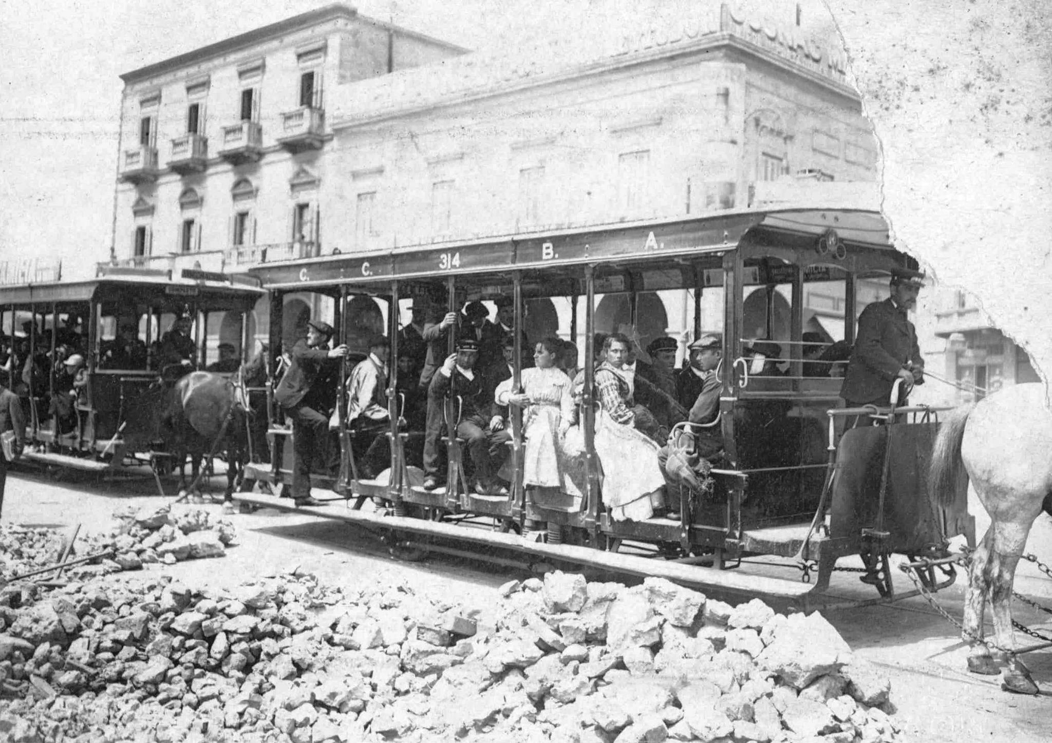 Buenos Aires. "Tranvía de Inmigrantes", 1912. Iba del embarcadero al Hotel de Inmigrantes. Coche de la Compañía Ciudad de Buenos Aires con tracción a sangre. Inventario AGN 146211.